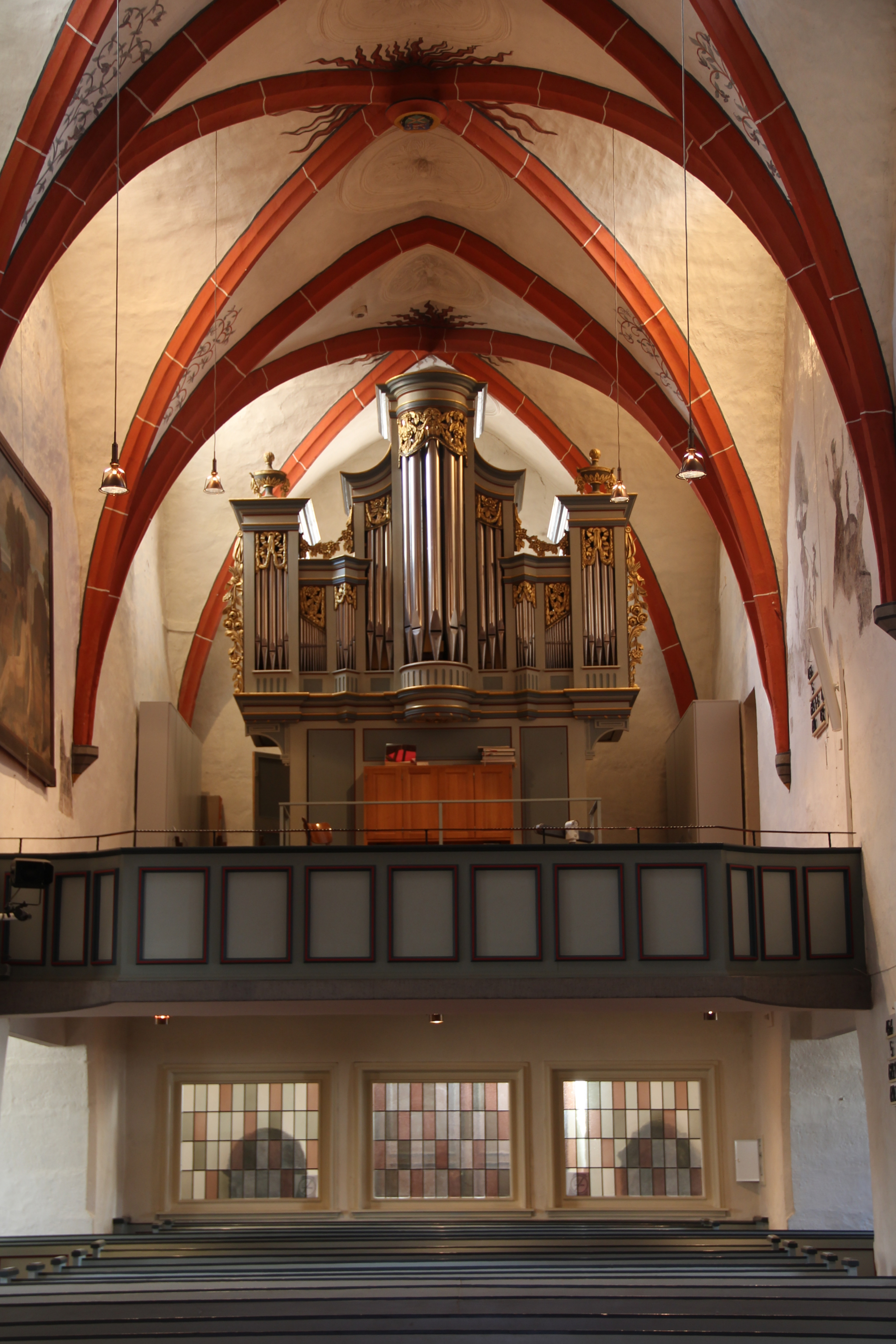 Innenaufnahme Martinskirche Gladenbach